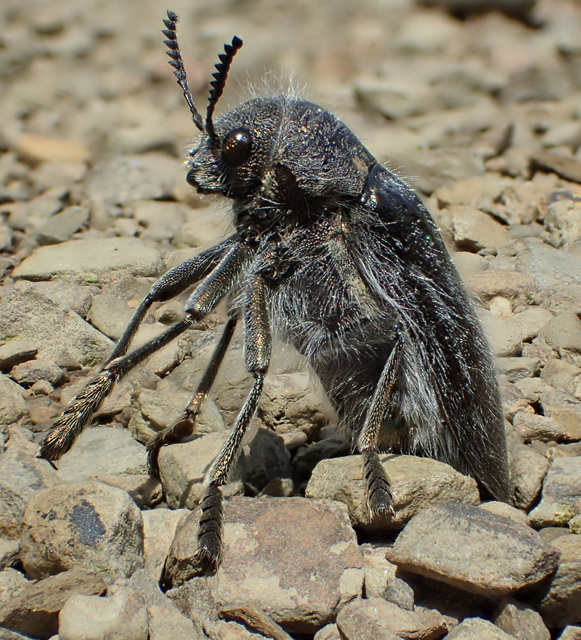 Julodis pubescens von Griechenland, Peloponnes, zwischen Krestena und Andritsena